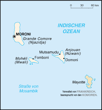 Karte der Komoren inkl. Mayotte